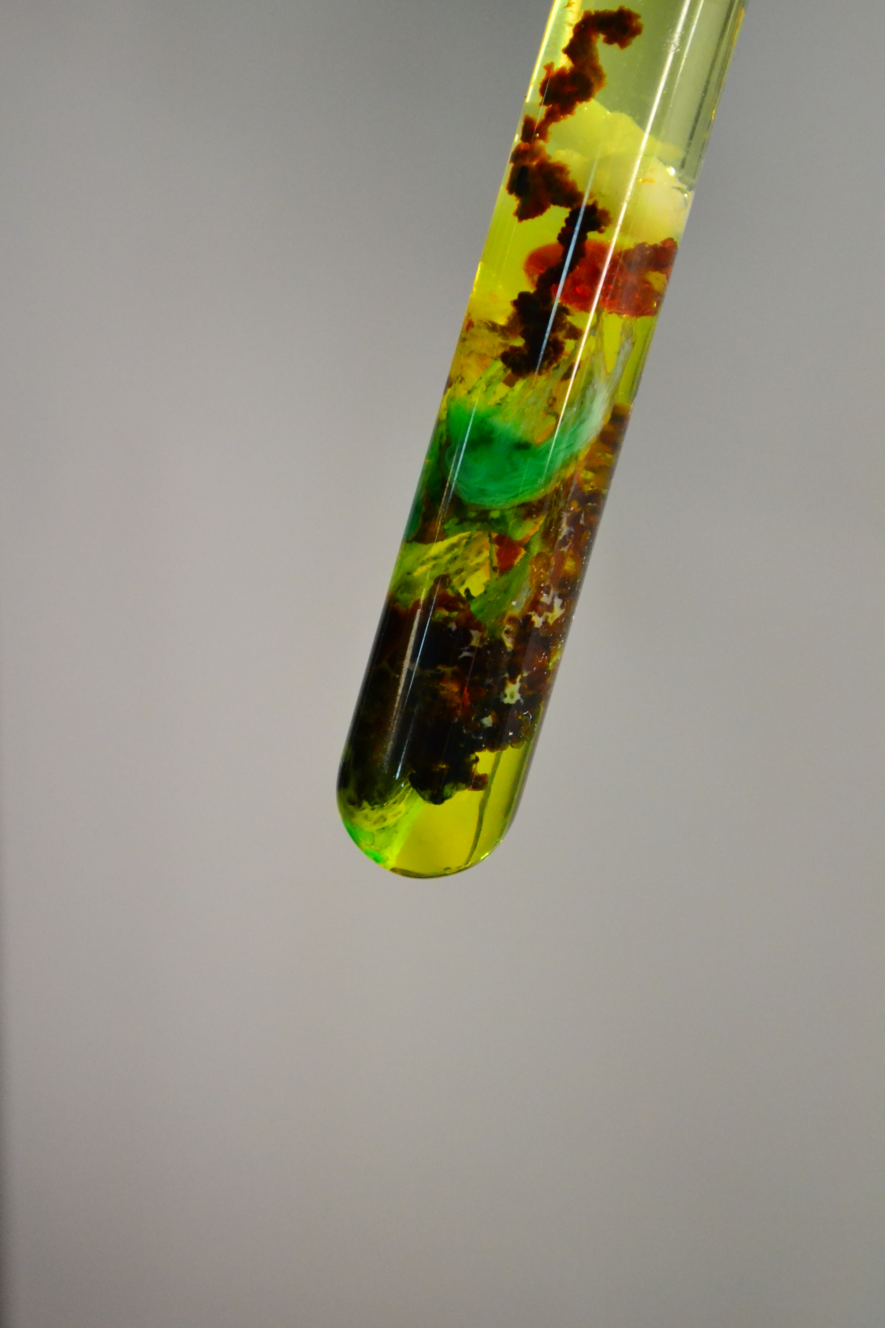 Silikatna bašta 2